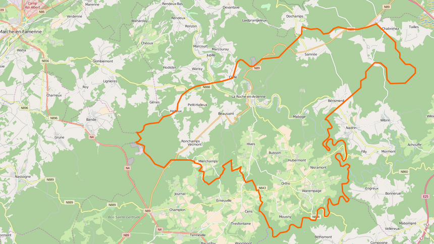 La Roche-en-Ardenne, Limites communales avec OSM.